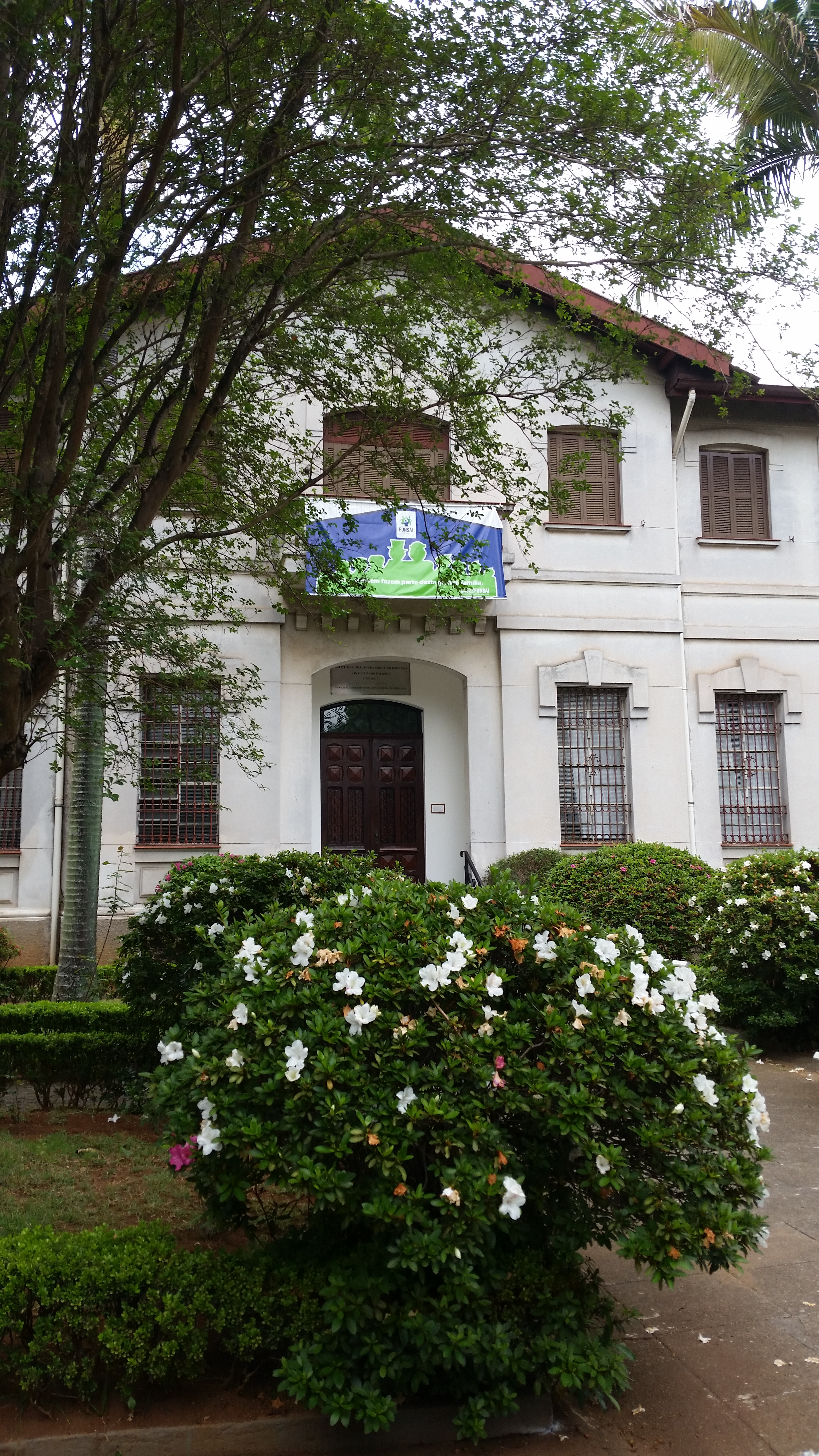 A parte central da fachada do edifício, precedida pelo jardim de arbustos.